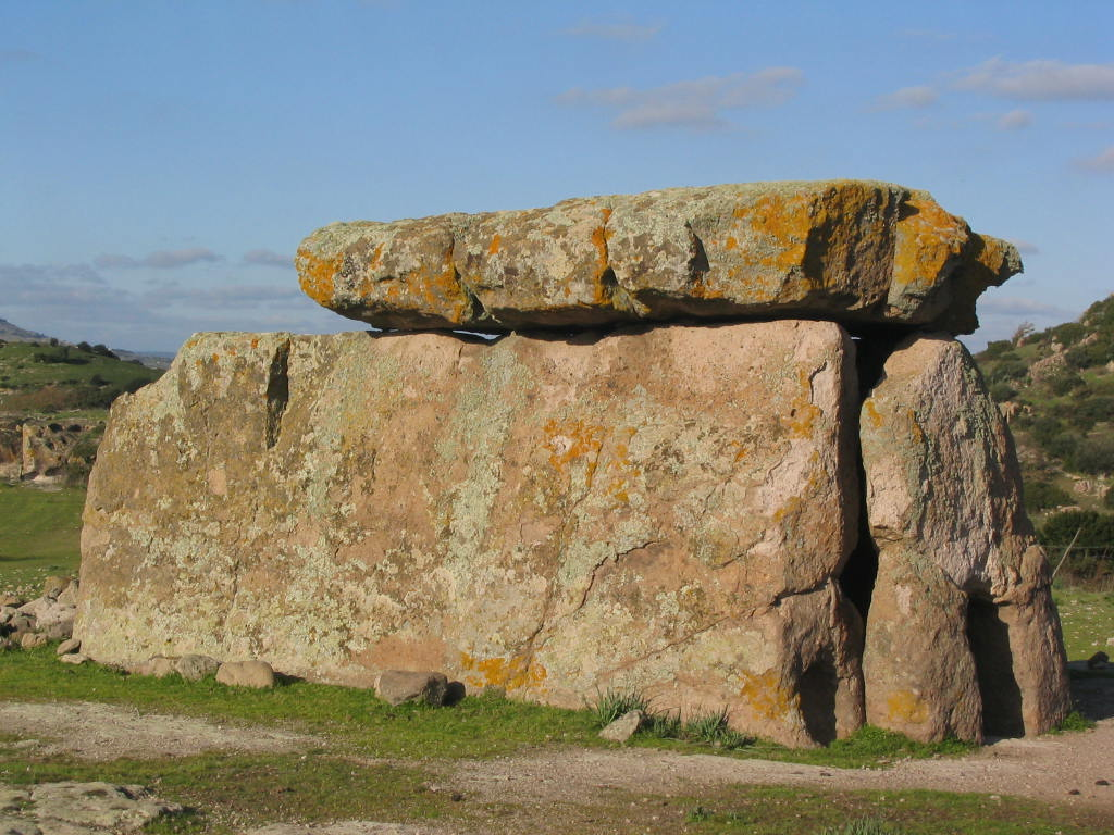 Mores, Sardegna, Italia